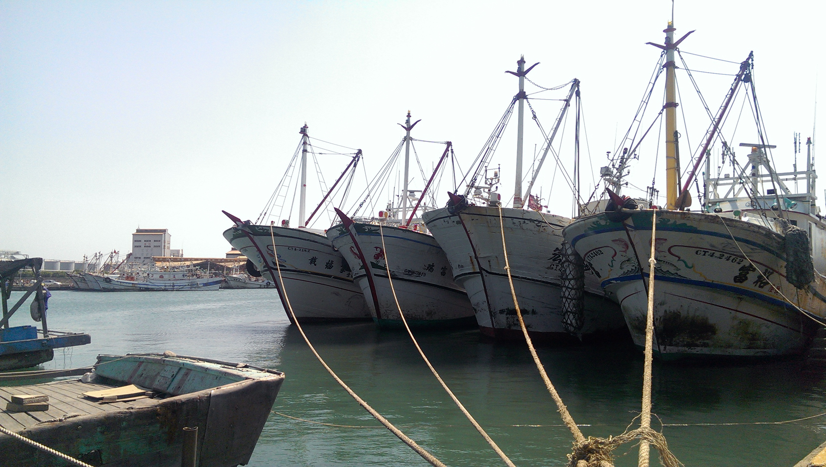 中文（台灣）: 梧棲漁港港口